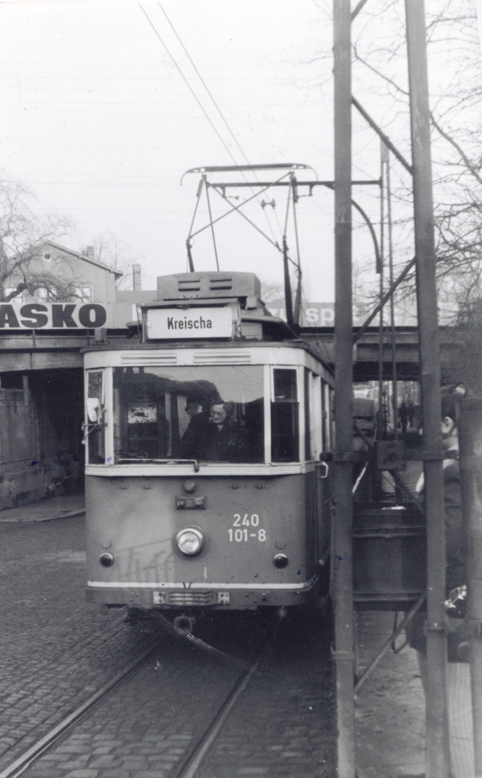 Tw 240 101 steht abfahrbereit am letzten Betriebstag in Niedersedlitz